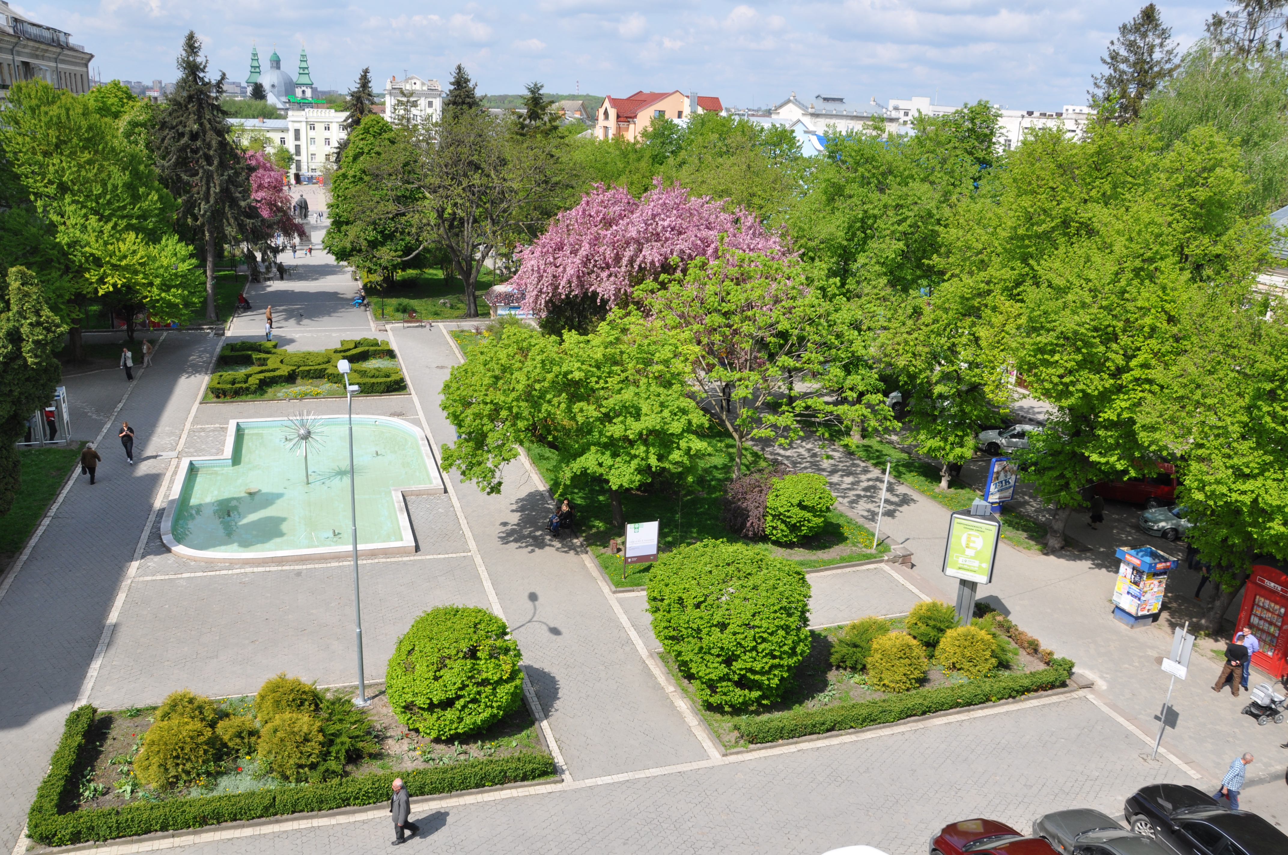 Парк-пам'ятка садово-паркового мистецтва місцевого значення «Сквер по вул. Чорновола» у м. Тернополі на вул. В'ячеслава Чорновола, між Театральним майданом та вул. Коперника.